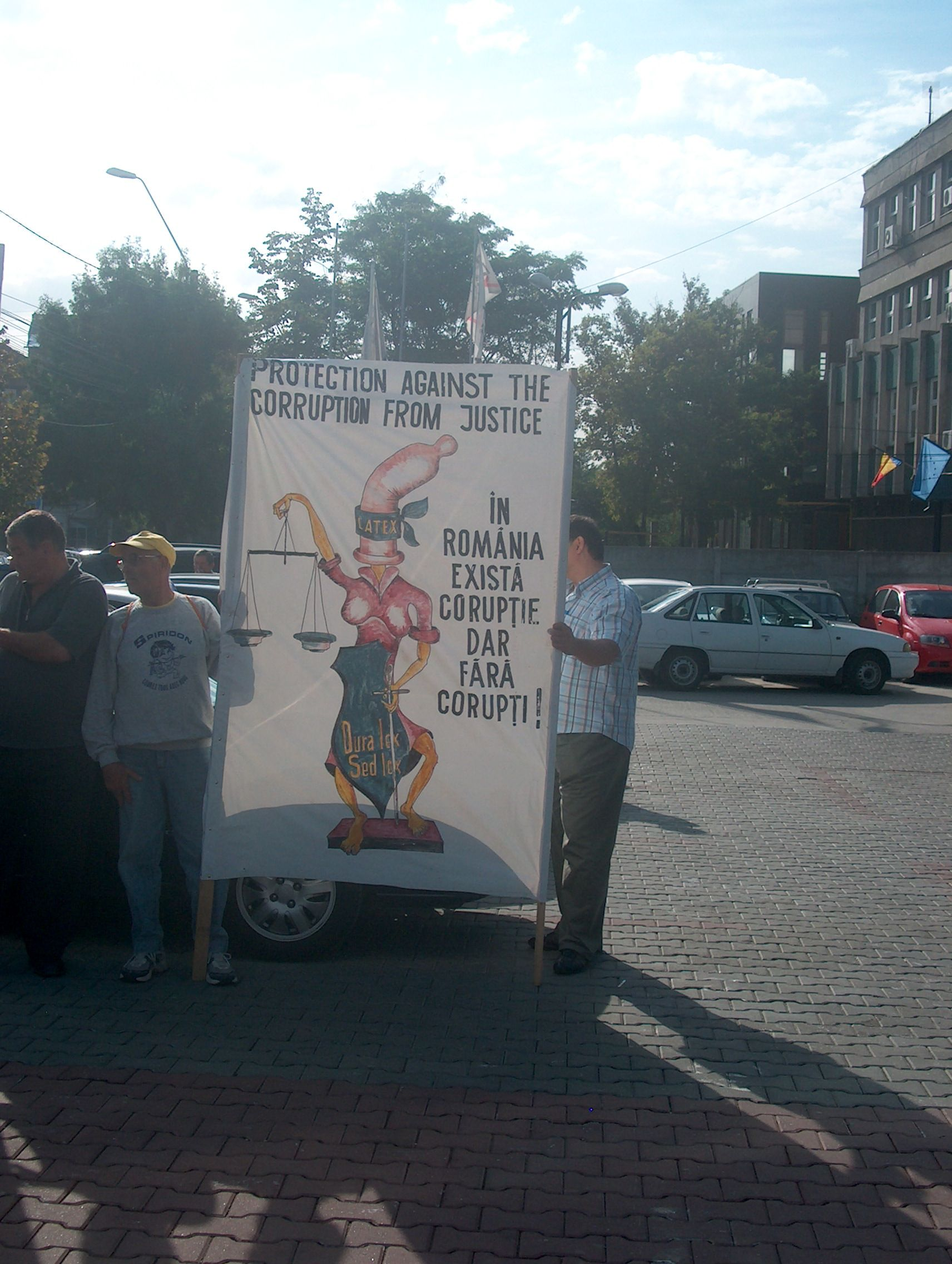 Manifestaţie anti-corupţie, Bucureşti, în faţa clădirii CSM